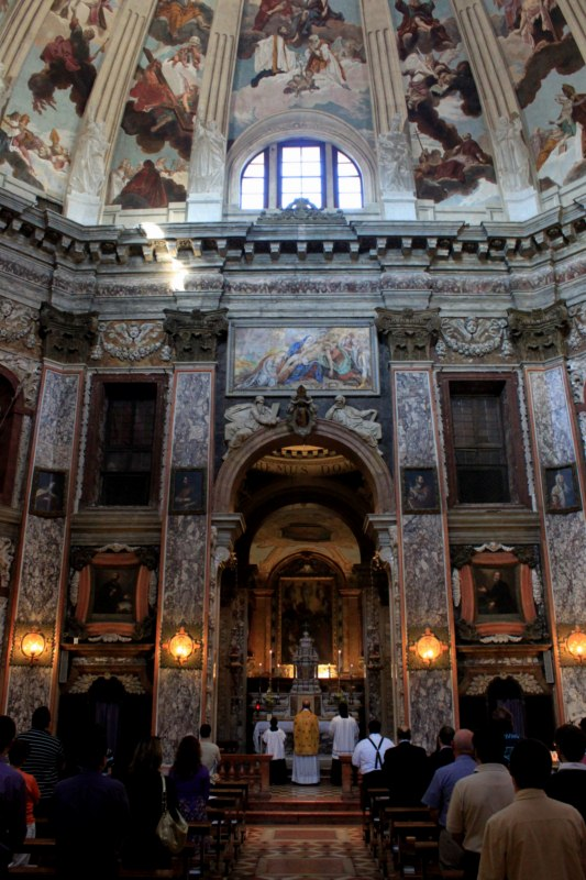 Chiesa di San Gaetano a Padova